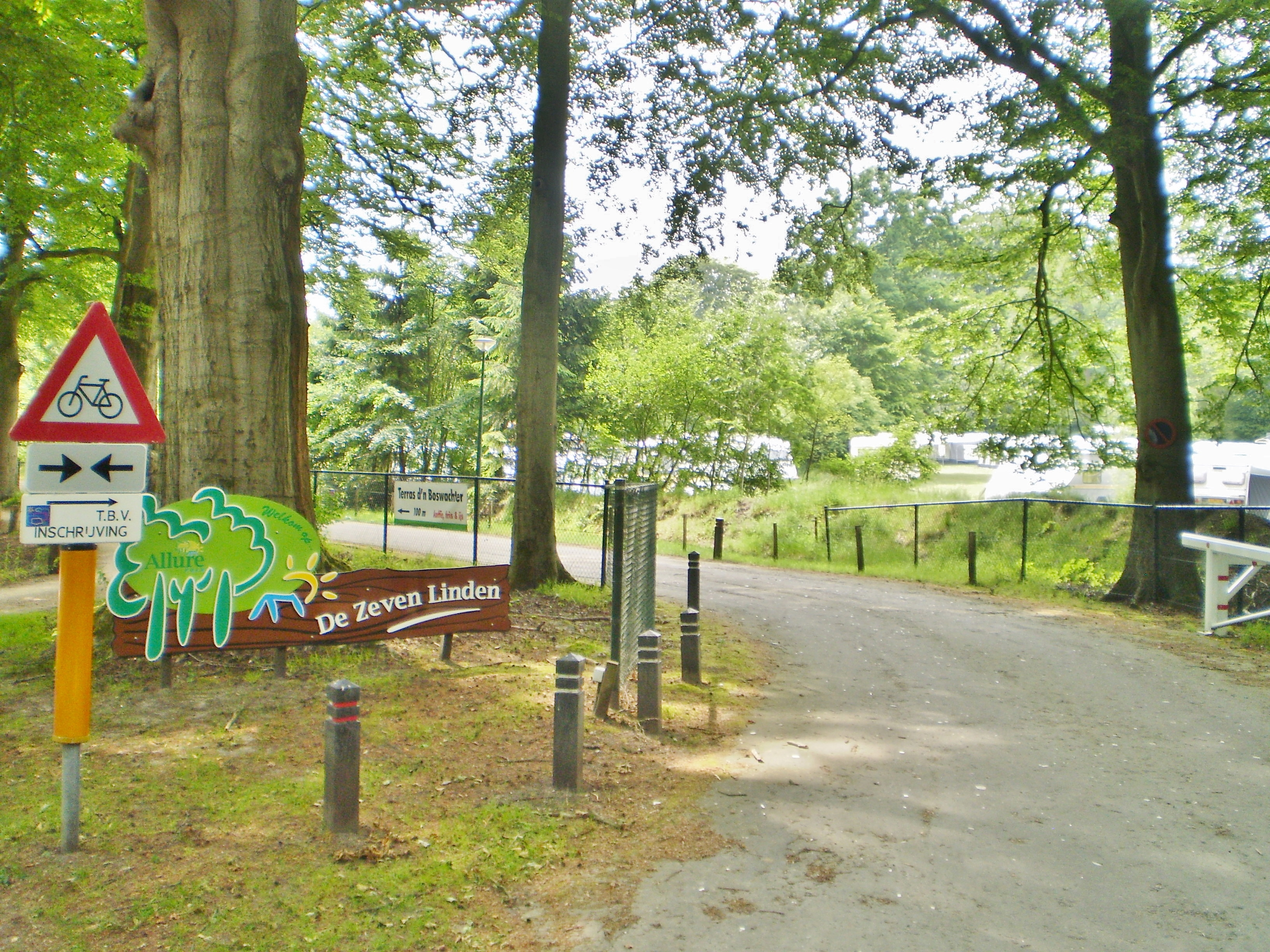 Baarn, Zevenlindencamping